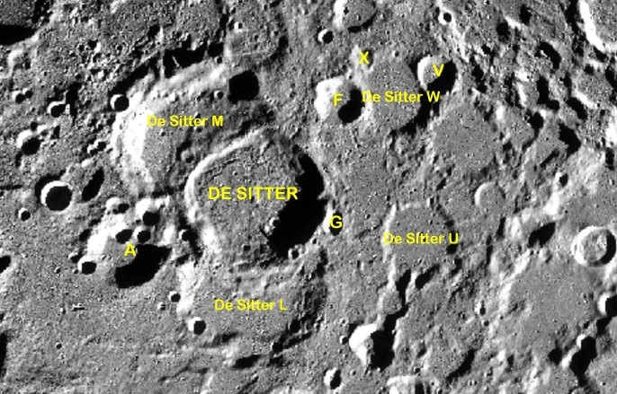 Cráter lunar De Sitter. Cráteres satélite. (LRO)